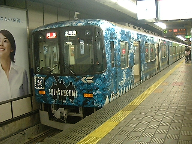 京阪9004 「新撰組!」ラッピング車両